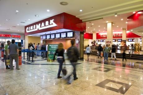 Vista da fachada do Cinemark Praiamar Santos